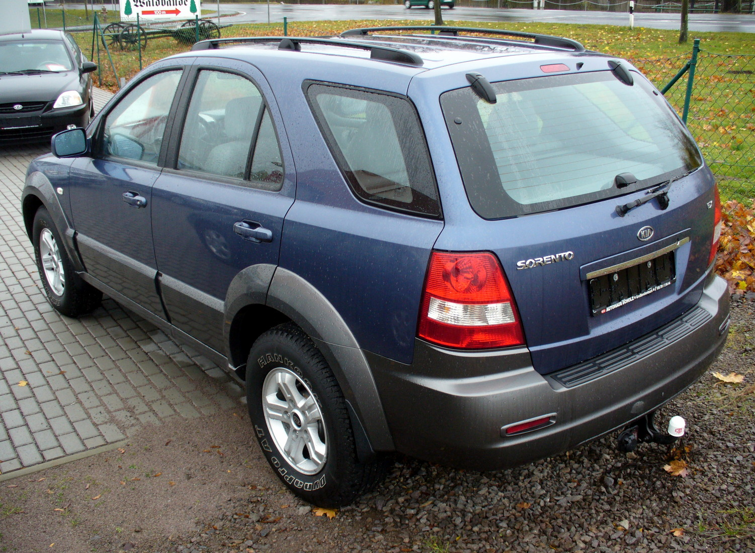 Kia Sorento